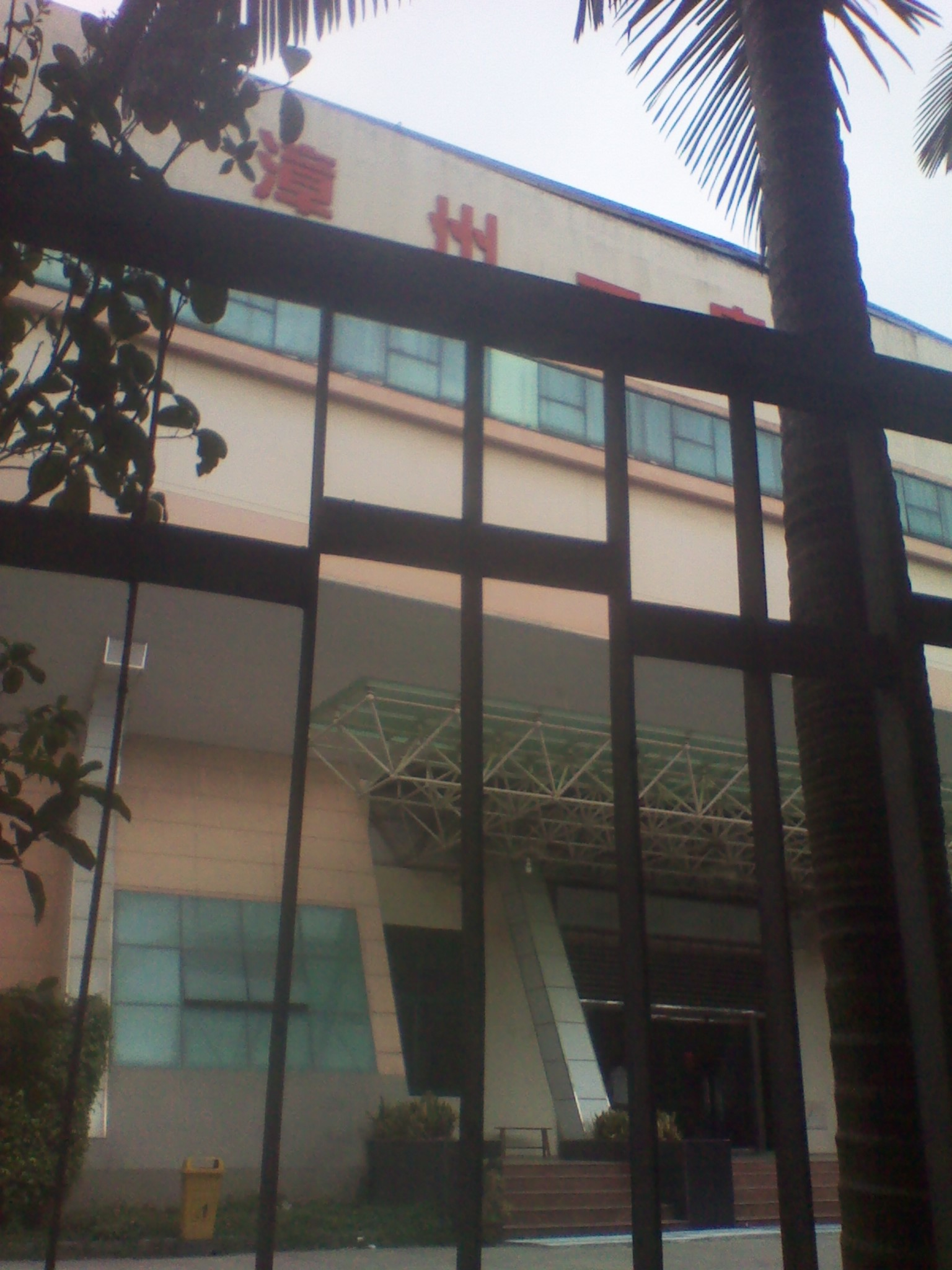 漳州一中体育馆。